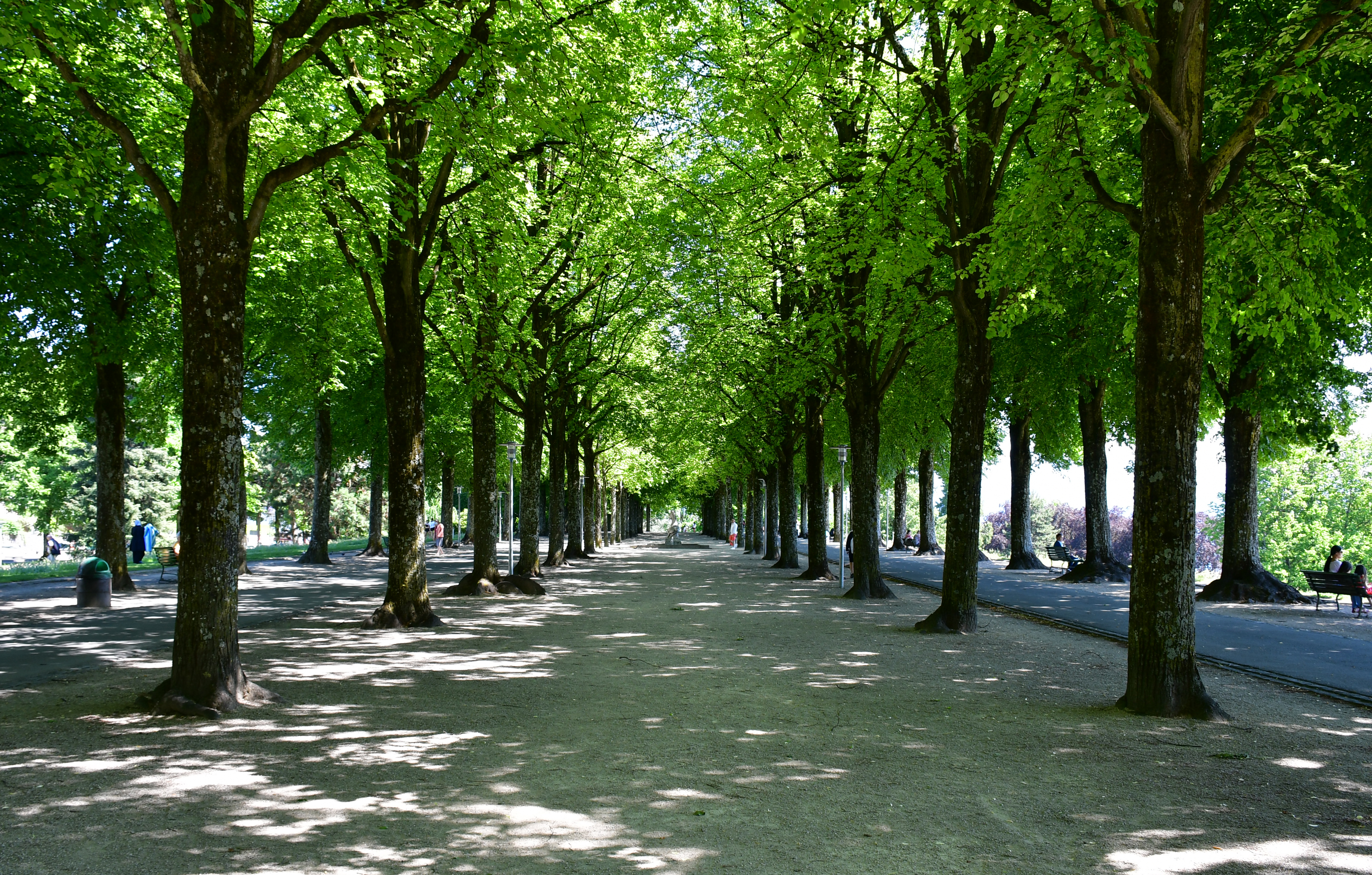 Le mail du parc de Valency, à Lausanne (Suisse).